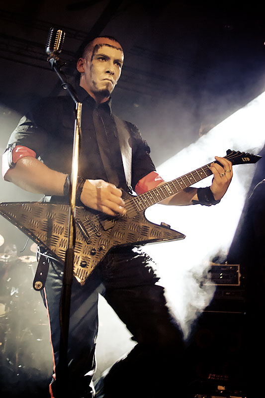 Vesania, Wrocław, Firlej, 13.05.2011